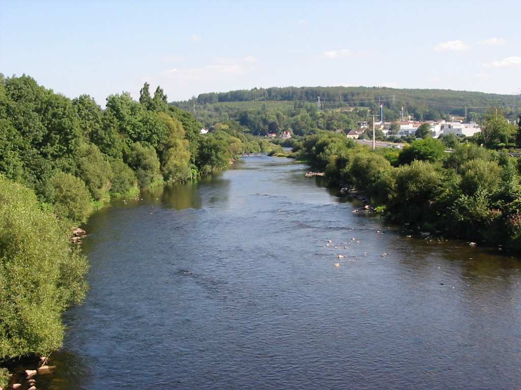 la Moselle entre Eloyes et Arches.